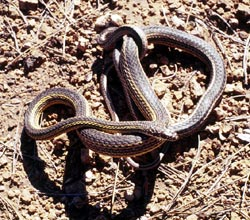 Gestreifte Peitschennatter (Masticophis taeniatus)